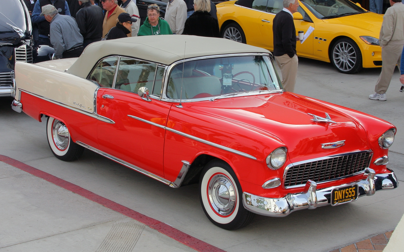 2011 Desert Classic, La Quinta, CA